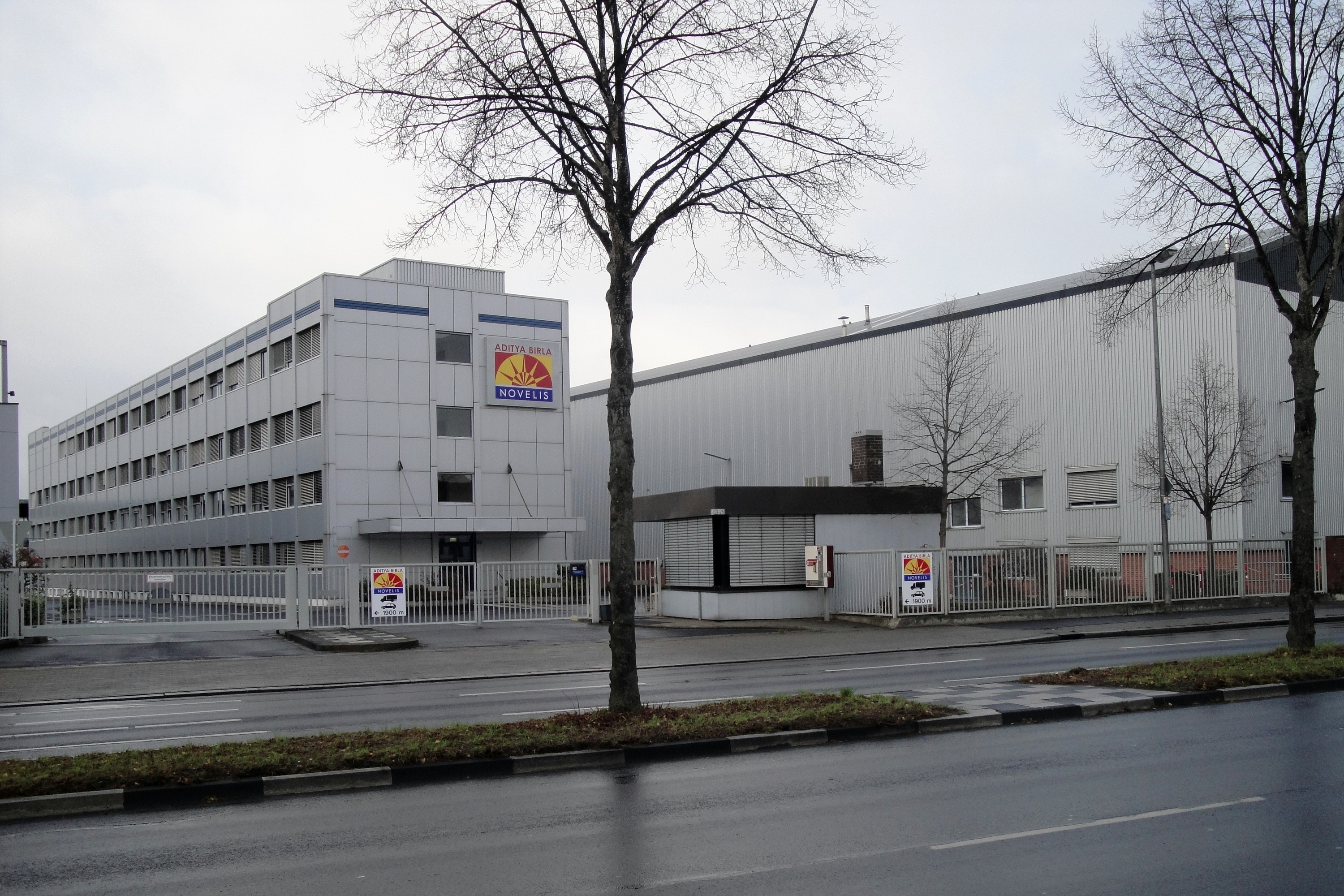 Aditya Birla Novelis in Göttingen